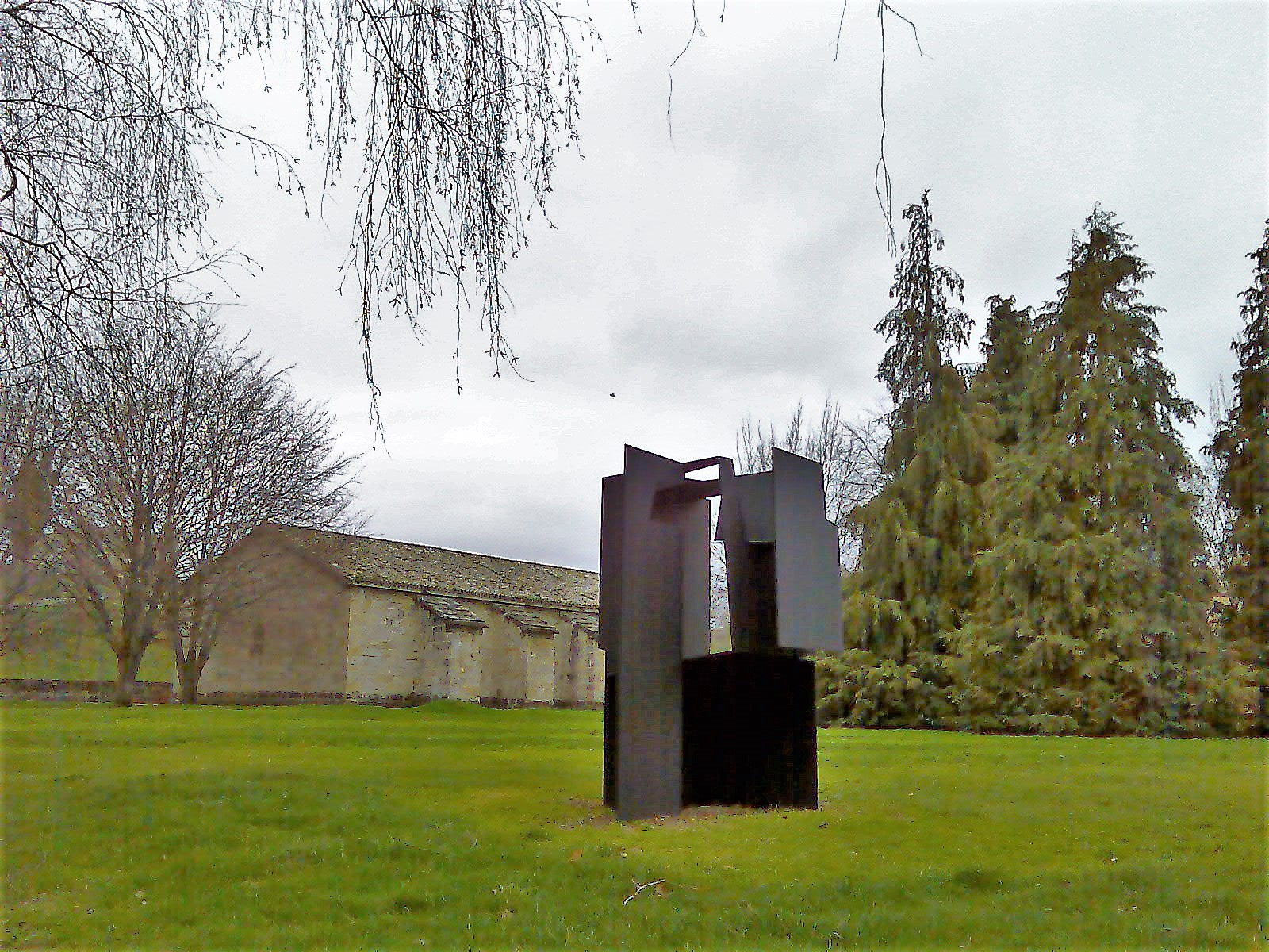 Sculpture Odiseo (1975), Parque de la Citadela in Pamplona